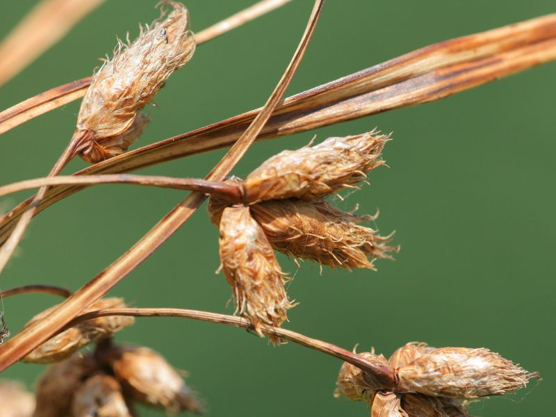 Verkannte Strandsimse (Bolboschoenus yagara)